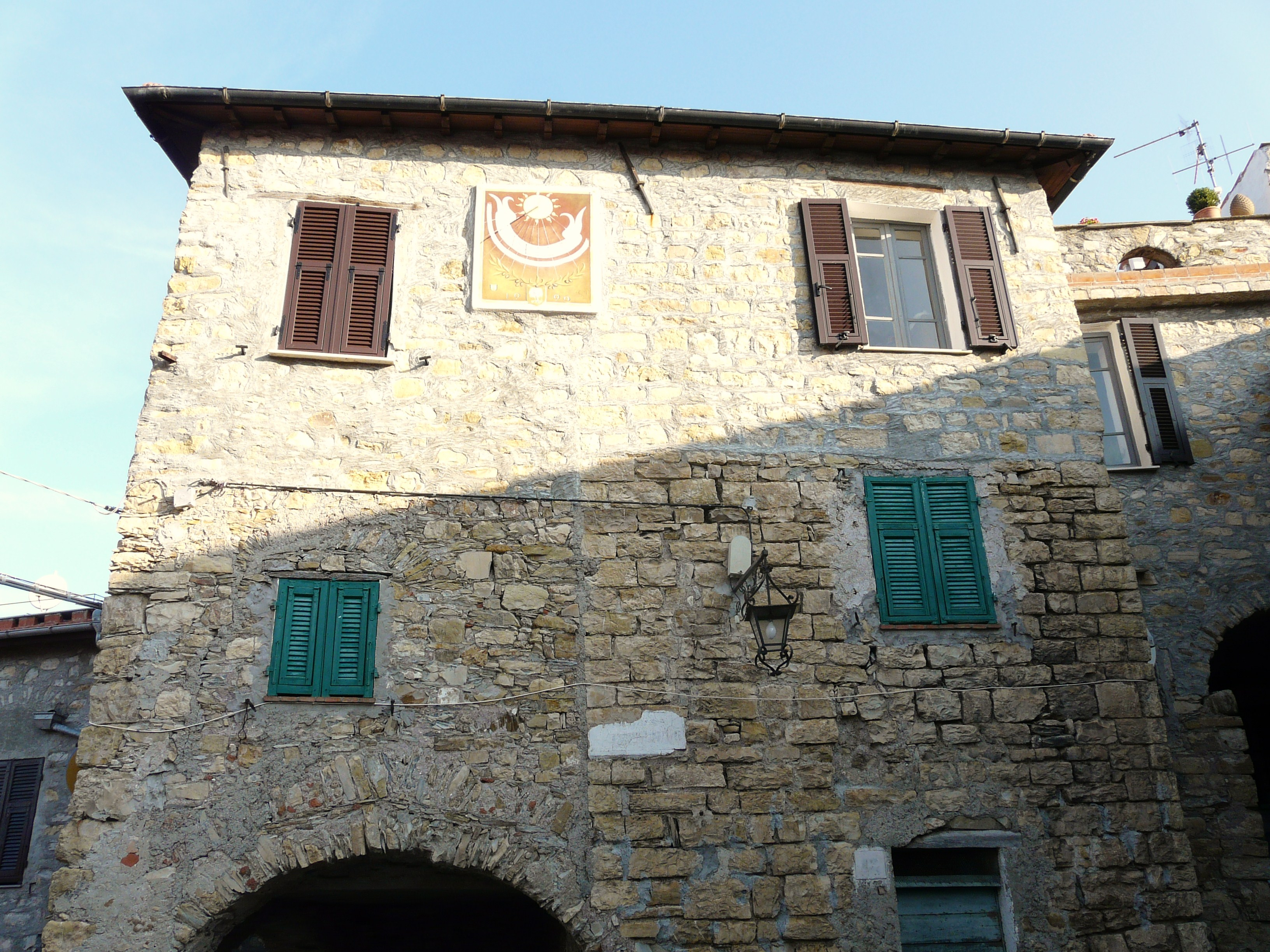 Centro storico della borgata Castello, Chiusanico, Liguria, Italia